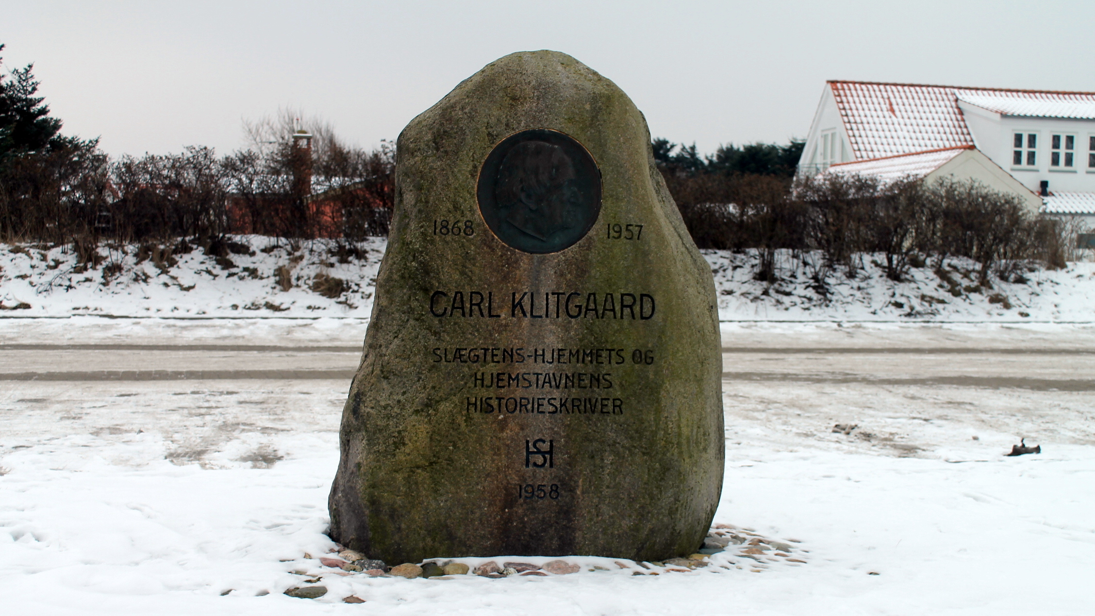 Mindestenen for Carl Klitgaard i Blokhus